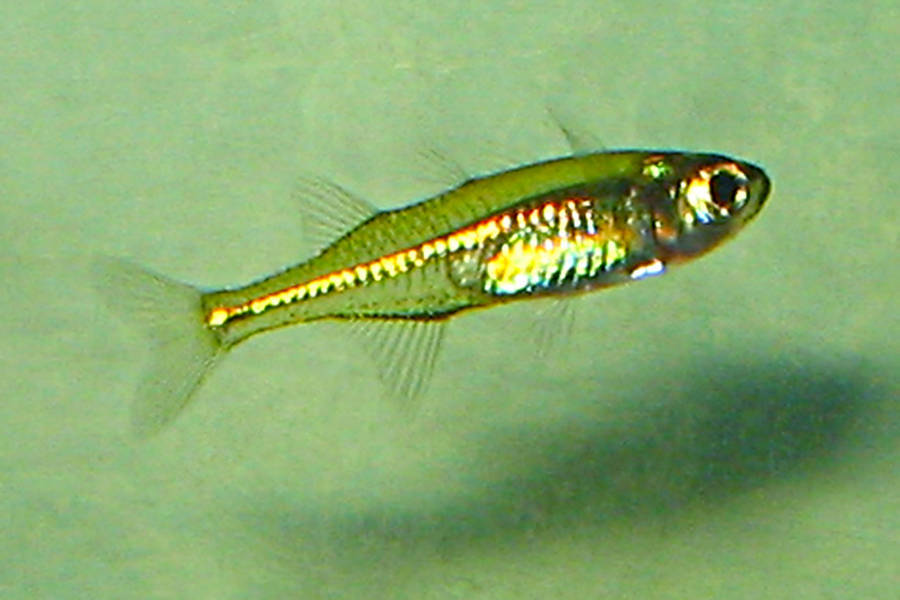 Capturado en la Ciénaga de Zapata